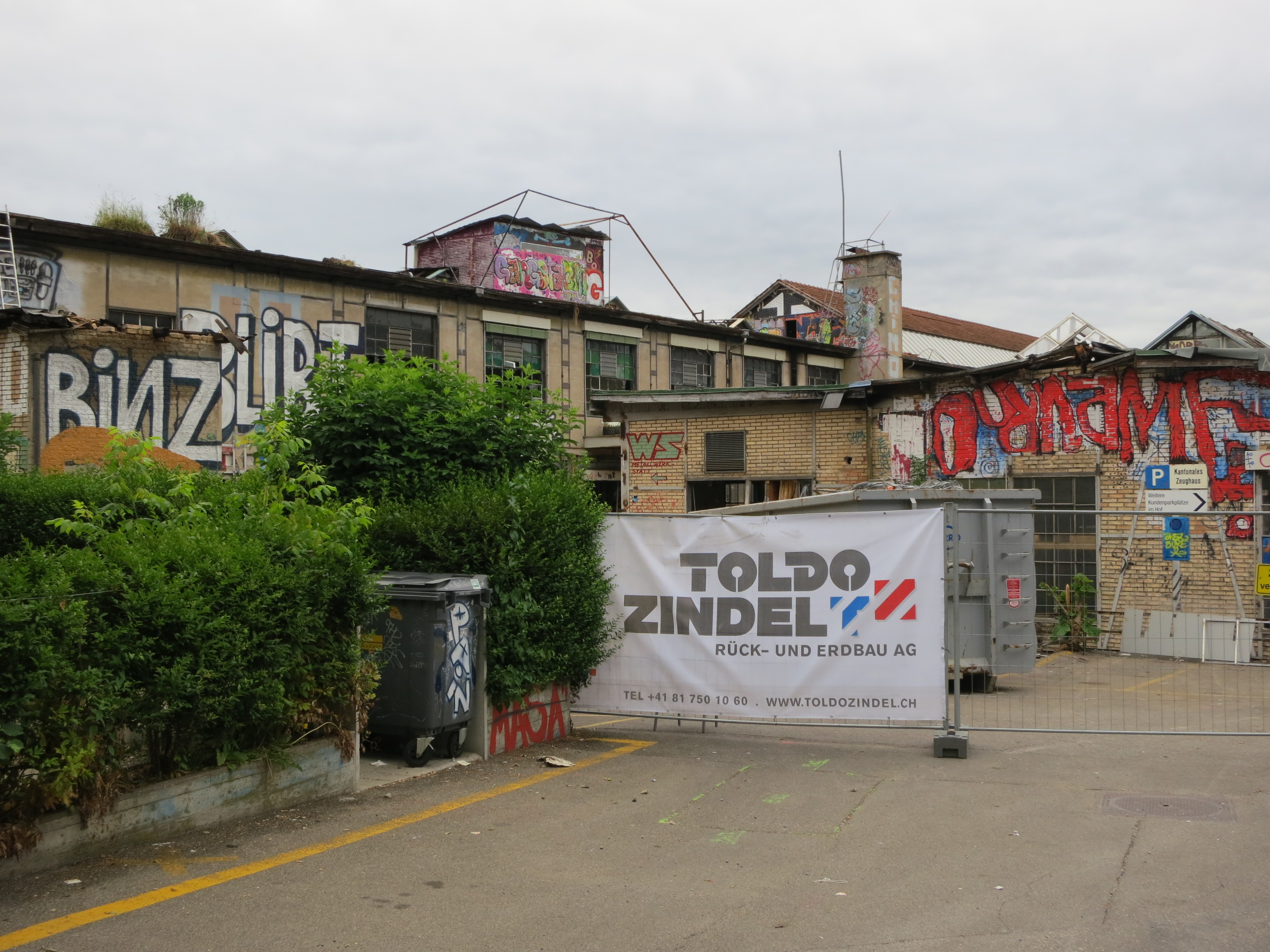 Hausbesetzung Binz, Zürich-Wiedikon, Schweiz